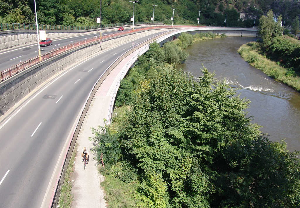 Eger in Karlsbad (Karlovy Vary)(2005)